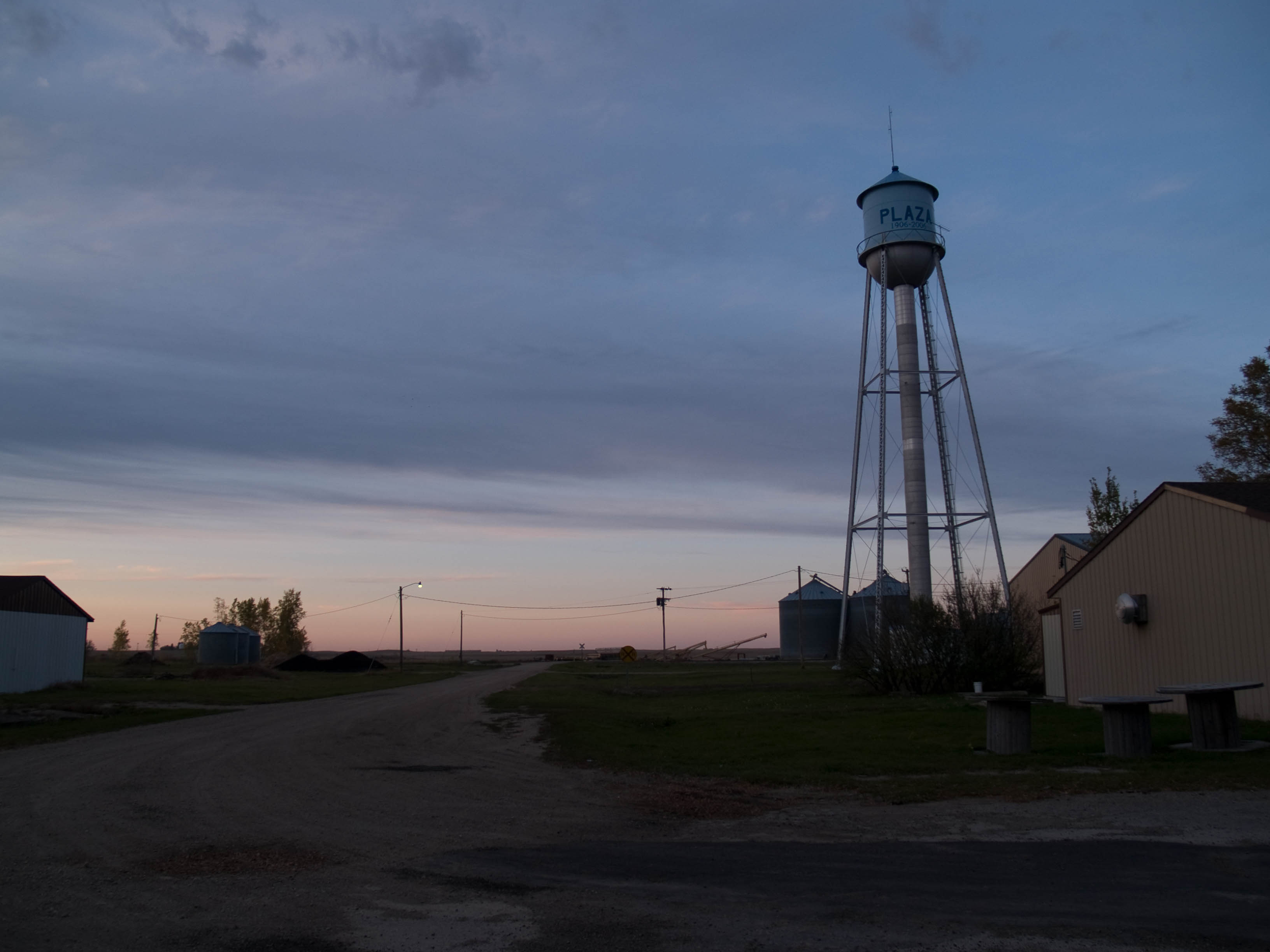 Plaza, North Dakota